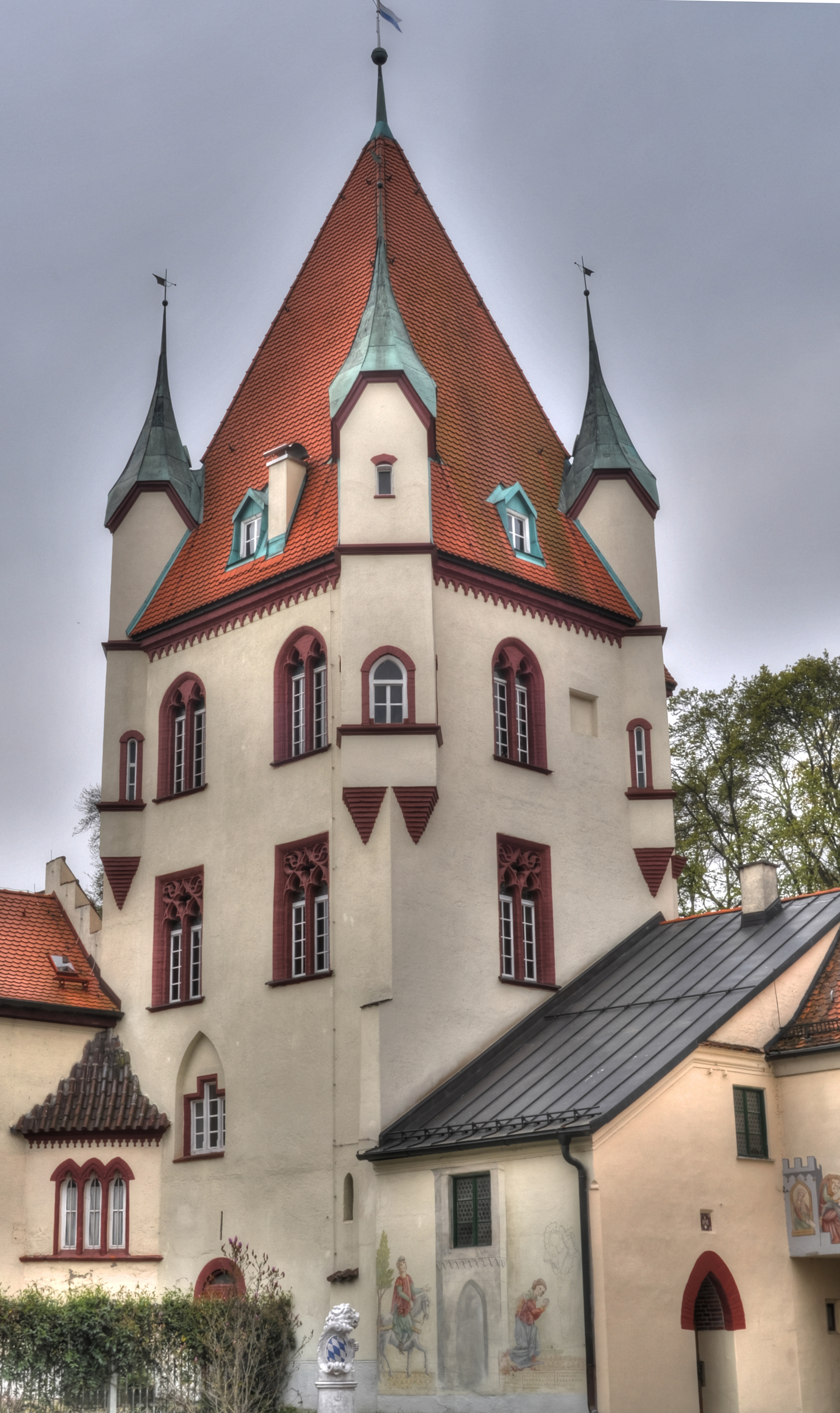 Das durch den Herzog von Oberbayern und Pfalzgraf bei Rhein Rudolf I 1292 gebaute Schloss ist heute im Besitz von Luitpold Prinz von Bayern. Der wiederum ist der Urenkel des letzten Bayrischen Königs Ludwig III und bewohnt das Schloss. Das Schloss ist nicht nur Schauplatz der alljährig stattfindenden "Kaltenberger Ritterspiele" sonder auch wegen des hervorragenden Weißbieres, das in der schlosseigene "König Ludwig Schloss Brauerei" hergestellt wird, über die Landesgrenzen hinaus bekannt. Built by the Duke of Bavaria and Count Palatine of Rhine Rudolph I 1292, the castle is now owned by Prinz Luitpold of Bavaria. He is the great-grandson of the last Bavarian king Ludwig III and inhabited the castle. The castle is not only the scene of the each year held "Kaltenberger Ritterspiele". It is also known because of the excellent white beer that is manufactured in the castle's own "King Ludwig's Castle Brewery".